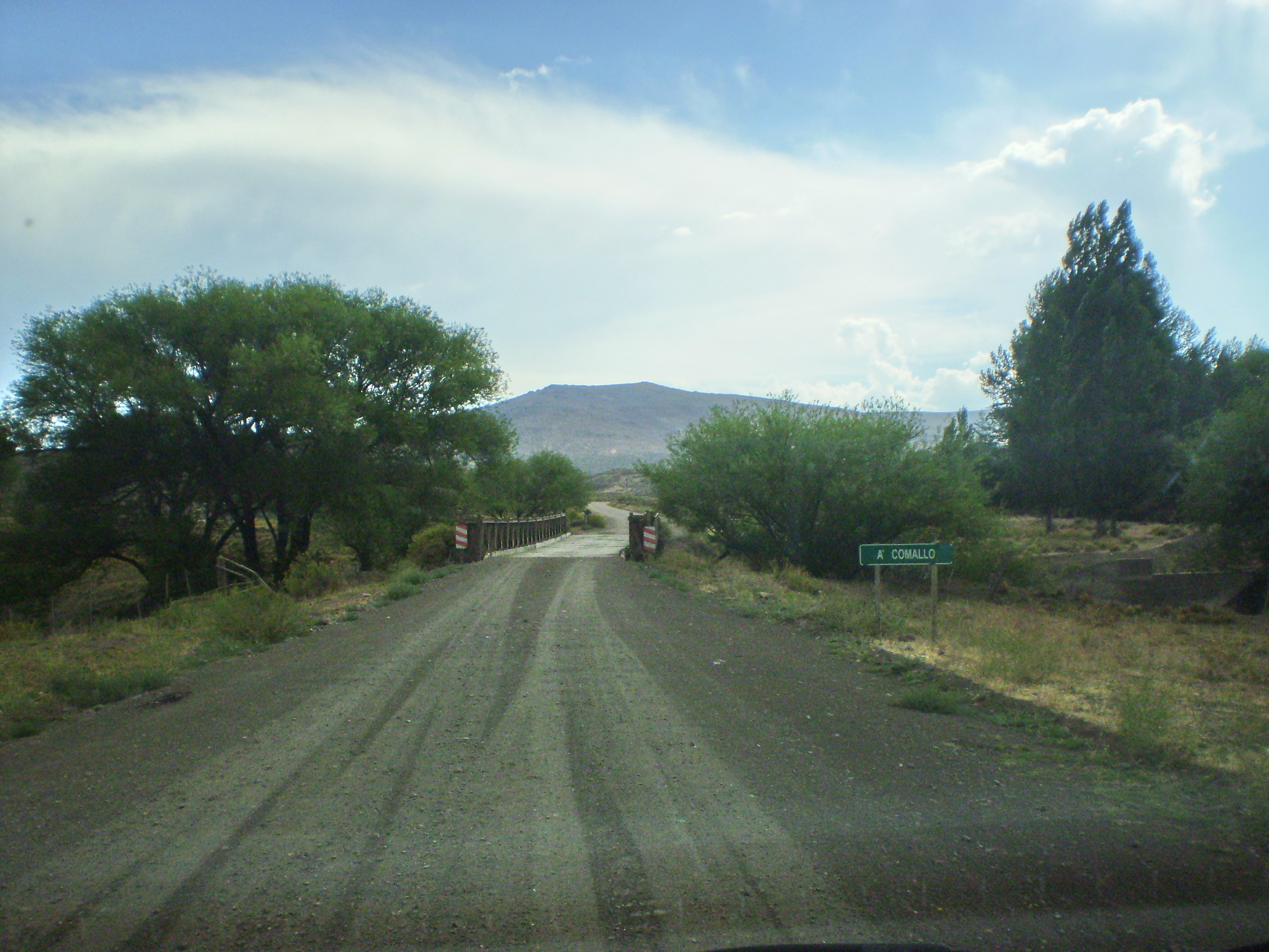 Puente sobre el arroyo Comallo, ruta nacional 23 Rio Negro, Argentina